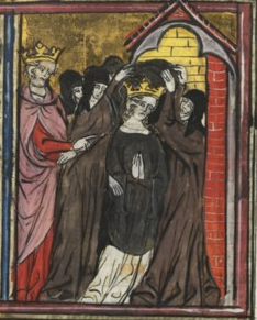 Répudiation d'Arda